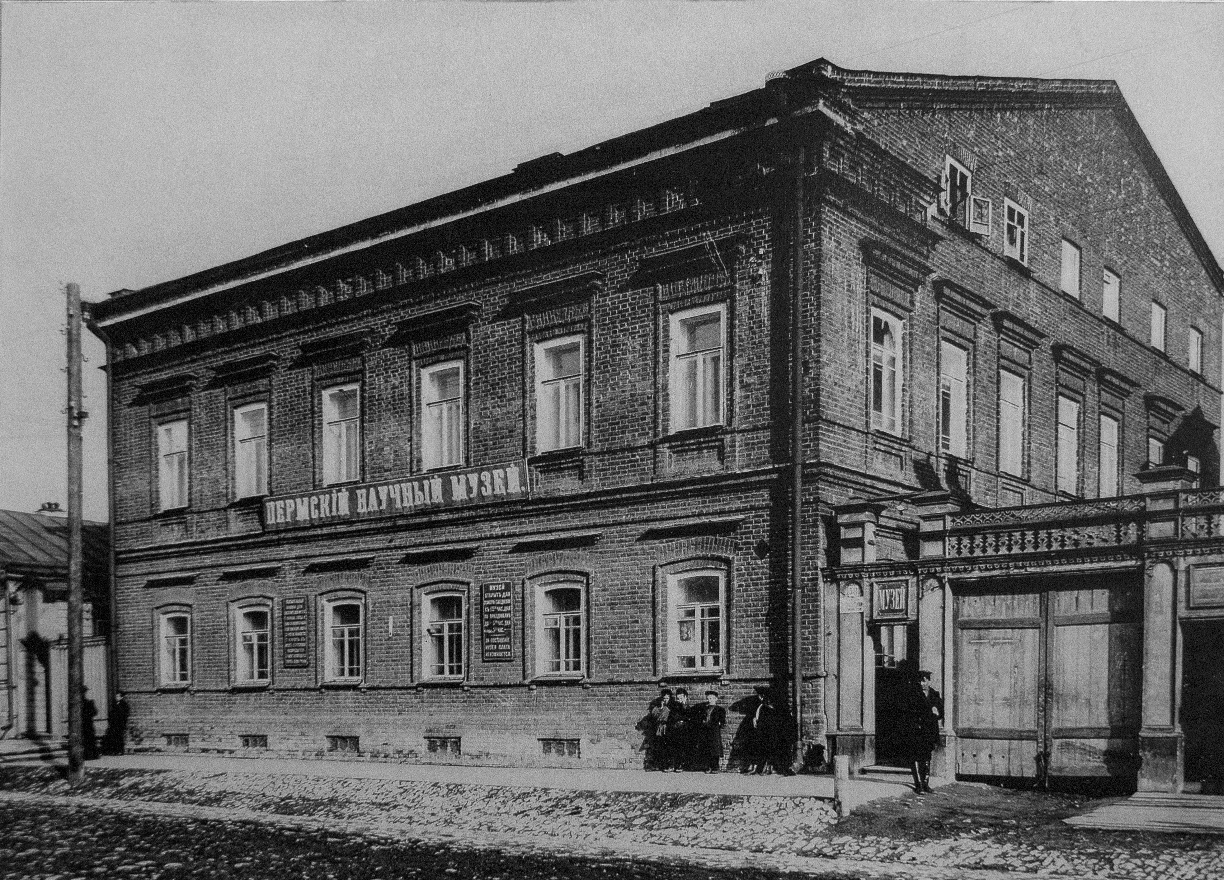 Здание Пермского научно-промышленного музея